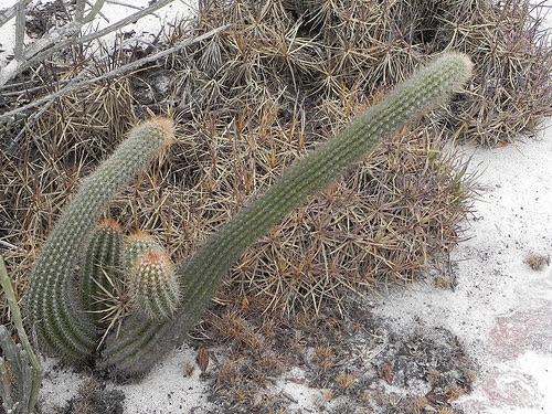 Bahia, Brasil